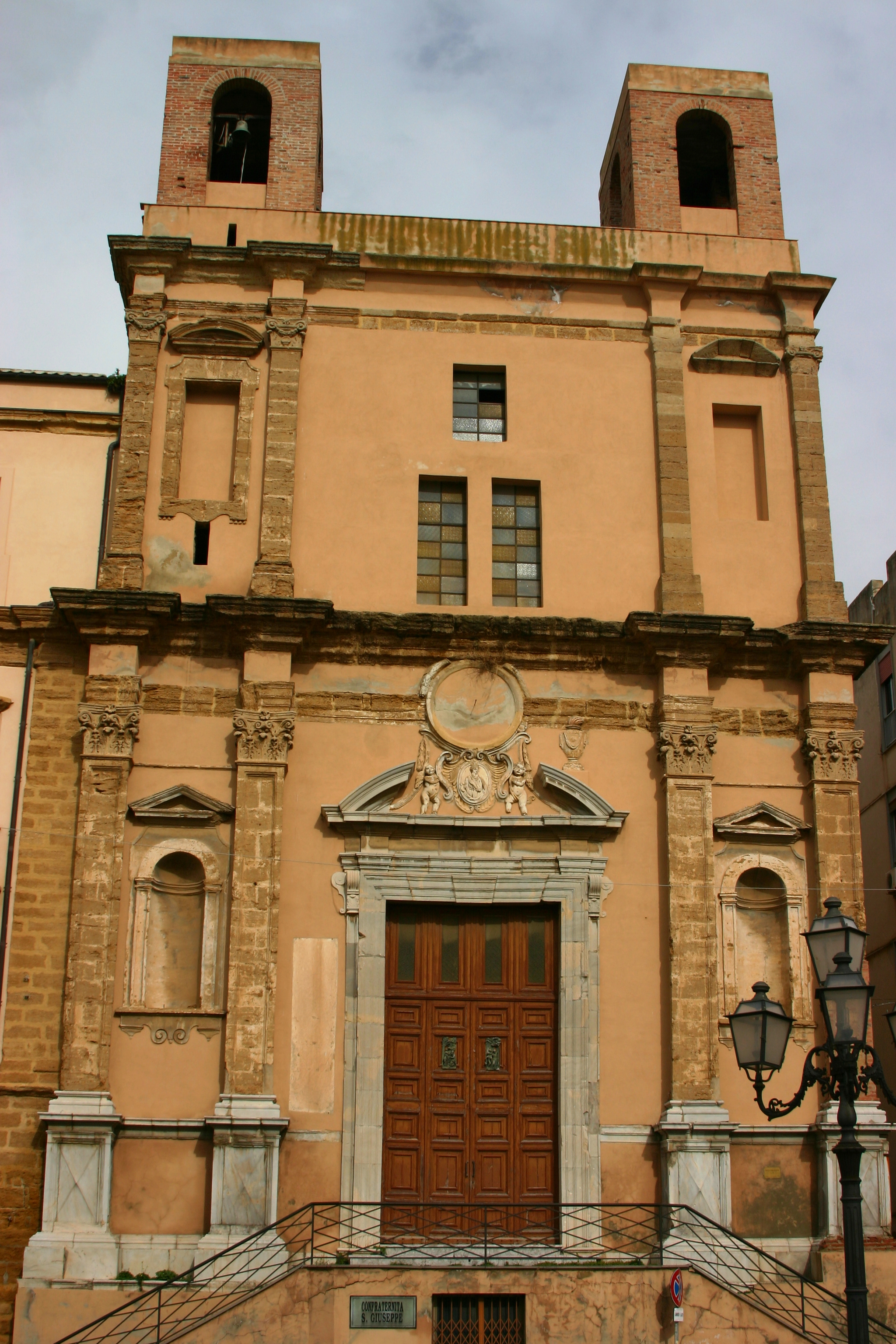 San Giuseppe